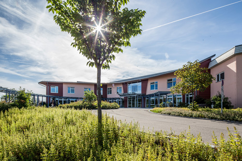 Die Außenansicht der Filderklinik.